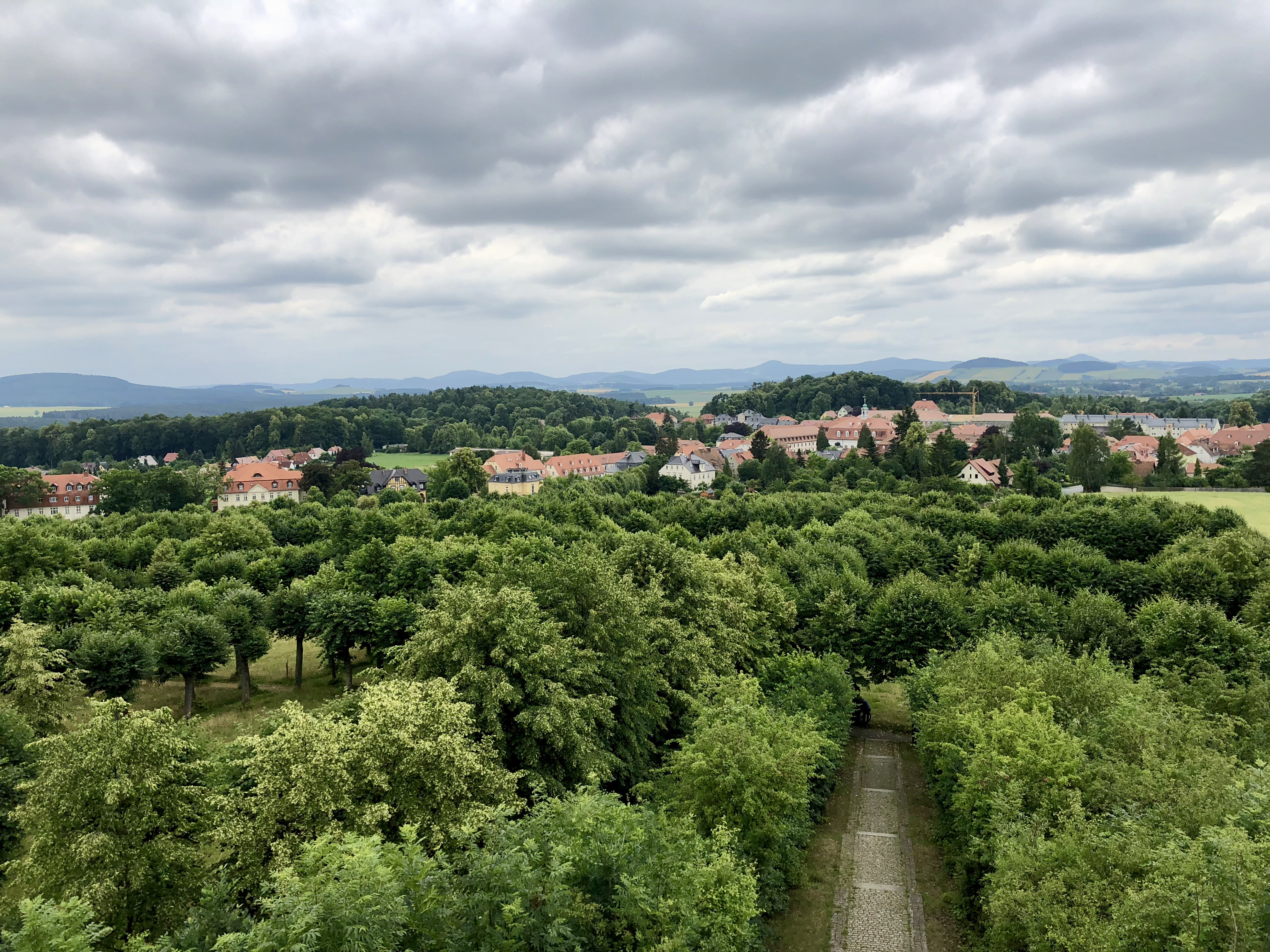 Blick vom Altan oberhalb des Gottesackers auf Herrnhut mit dem Gemeindesaal der Brüdergemeine im Zentrum des Ortes